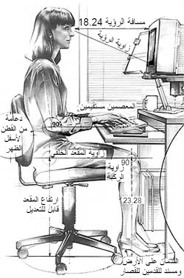 متغيرات محطة عمل الكمبيوتر